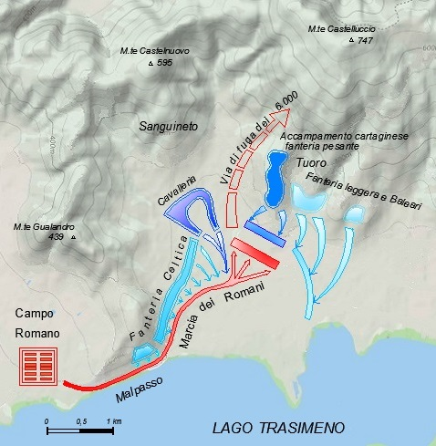 La battaglia del Trasimeno secondo la teoria esposta dal Prof. Brizzi e dal Dott. Gambini in "Di nuovo sulla battaglia del Trasimeno: qualche ulteriore considerazione", Rivista storica dell'antichità, anno XXXVII, Pàtron Editore 2007. La teoria aggiorna quelle precedenti, tenendo conto delle risultanze archeologiche e geologiche scoperte negli ultimi decenni.